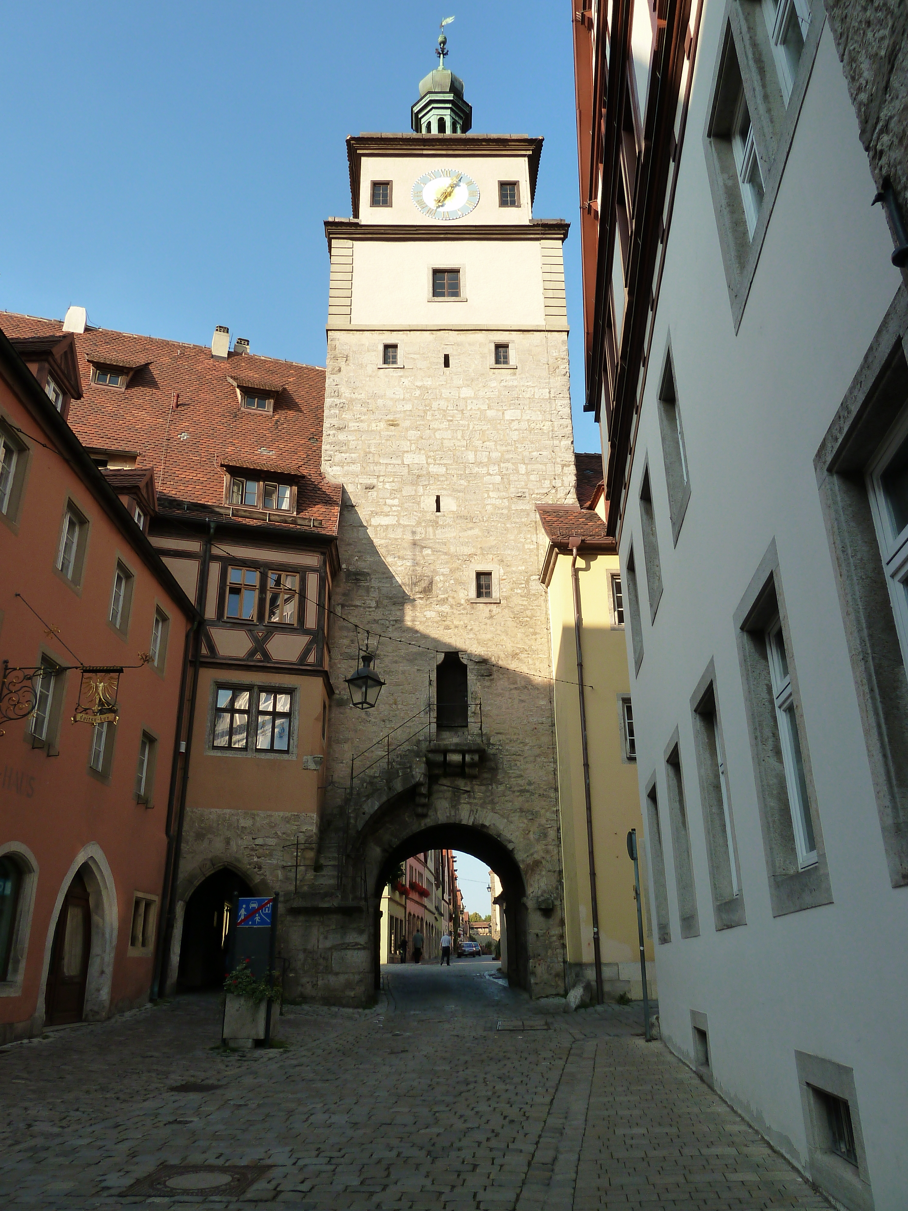 Rothenburg ob der Tauber: Weißer Turm